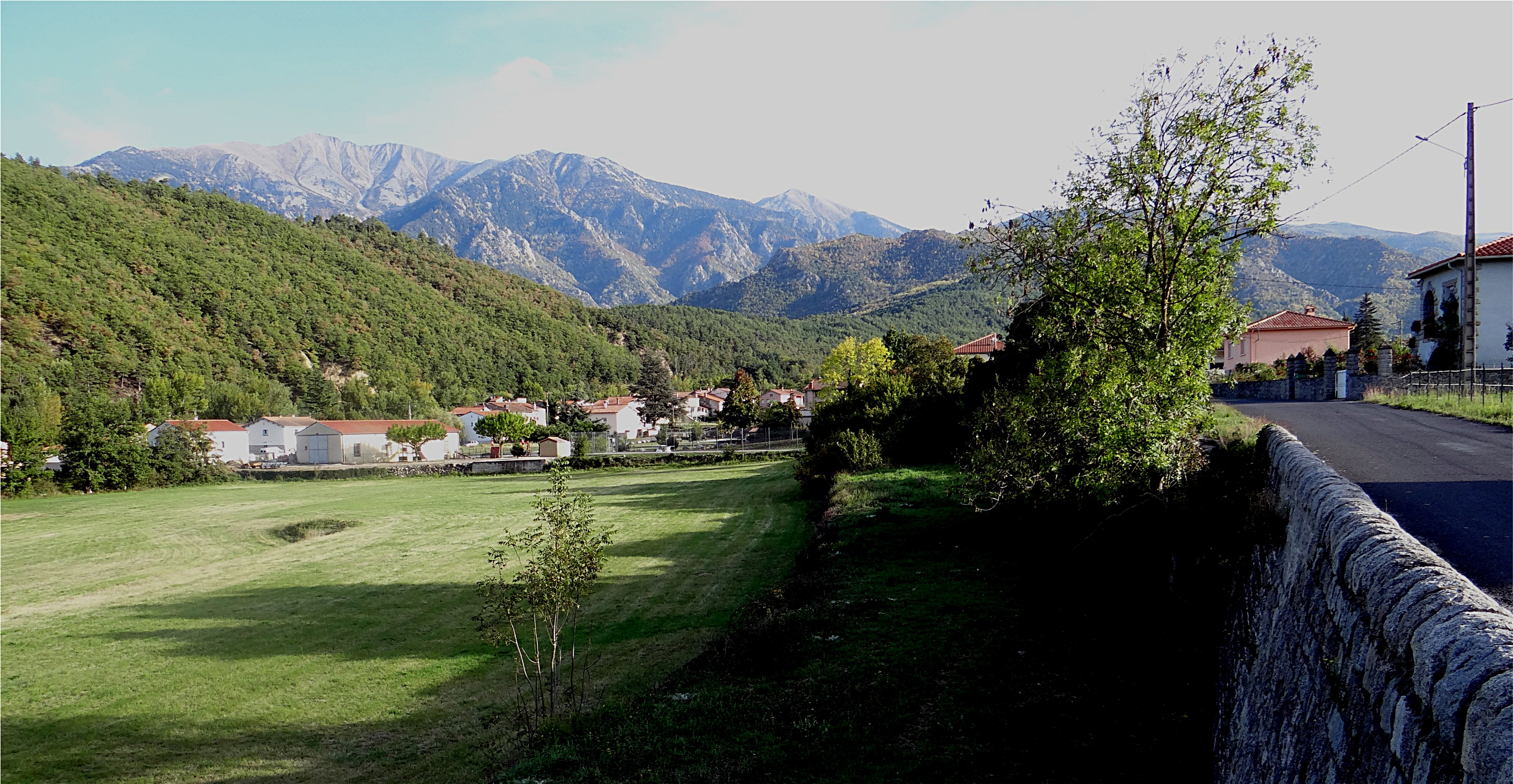 Fuilla du milieur et RD6, Fuilla, Pyrénées-Orientales, France.